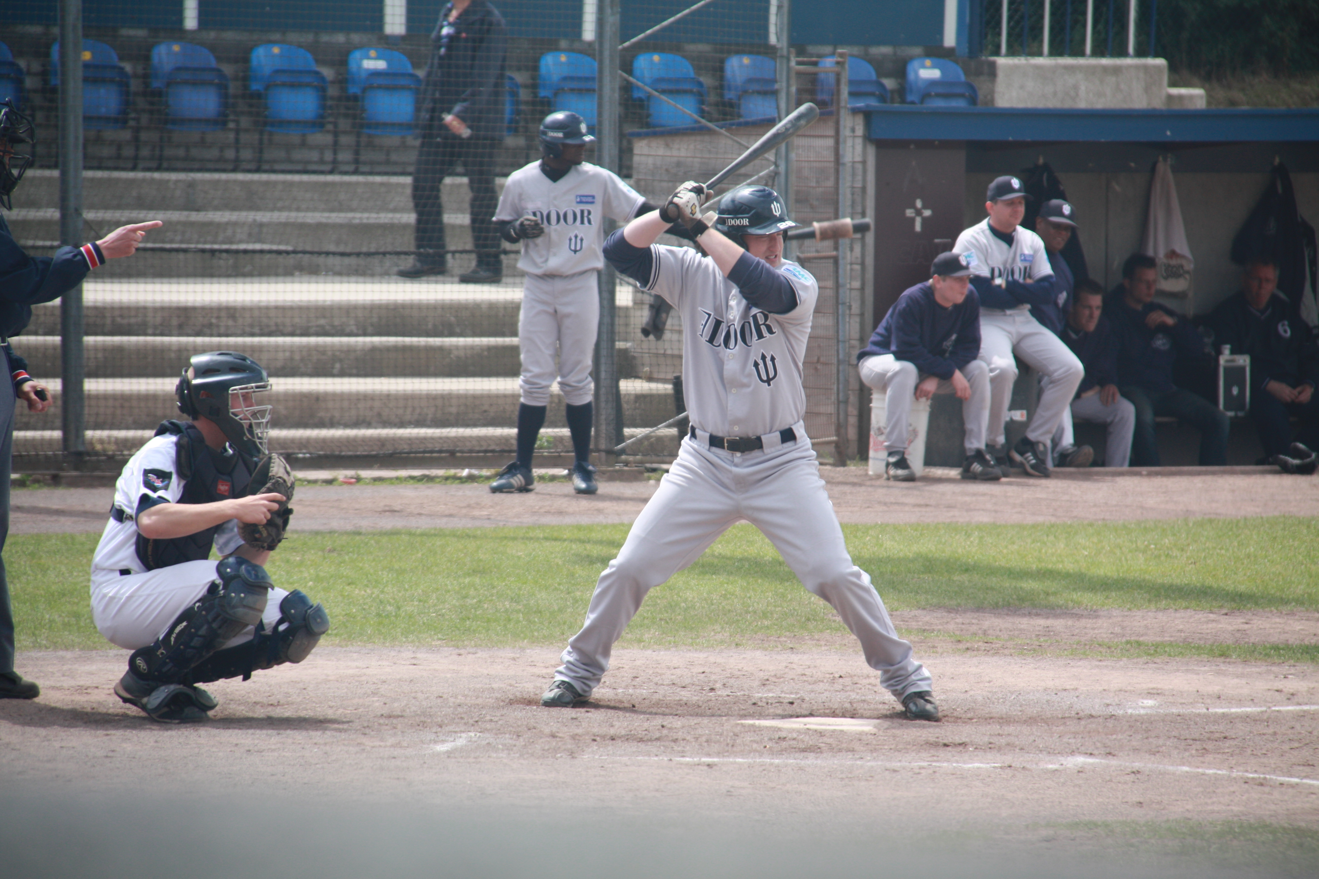 Honkbalwedstrijd tussen HCAW en Neptunus (honkbal) op 7 juni 2009